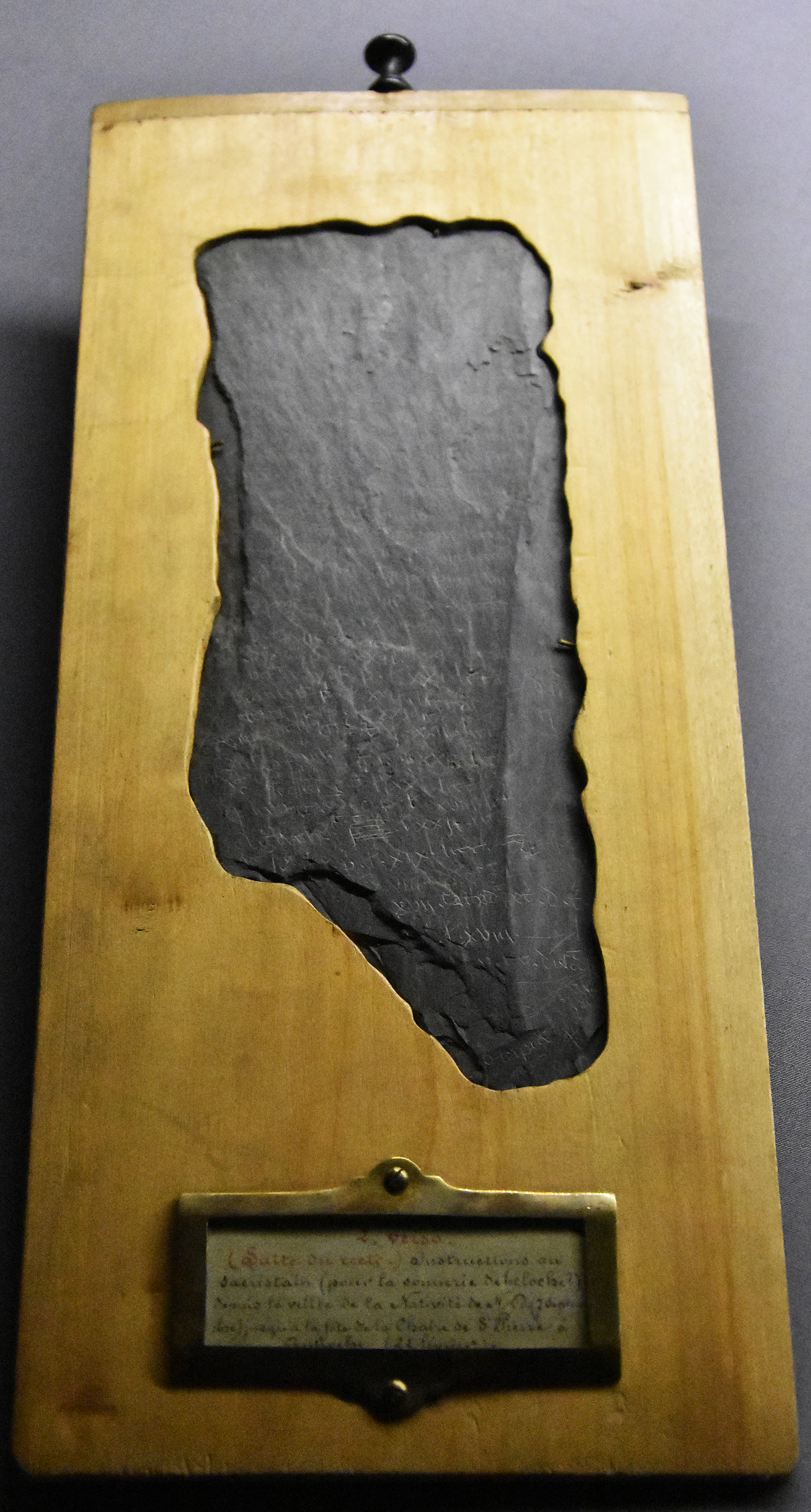 Tablet (leisteen 13e eeuw) Inscripties van de Abdij van Villers KBR Brussel 26-01-2019